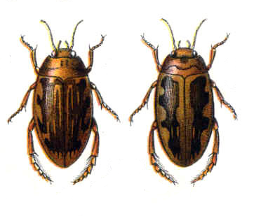 Laccophilus hyalinus (left) and Laccophilus obscurus (right). From Edmund Reitter (1845-1920): "Fauna Germanica: Die Käfer des deutschen Reiches" 1909.